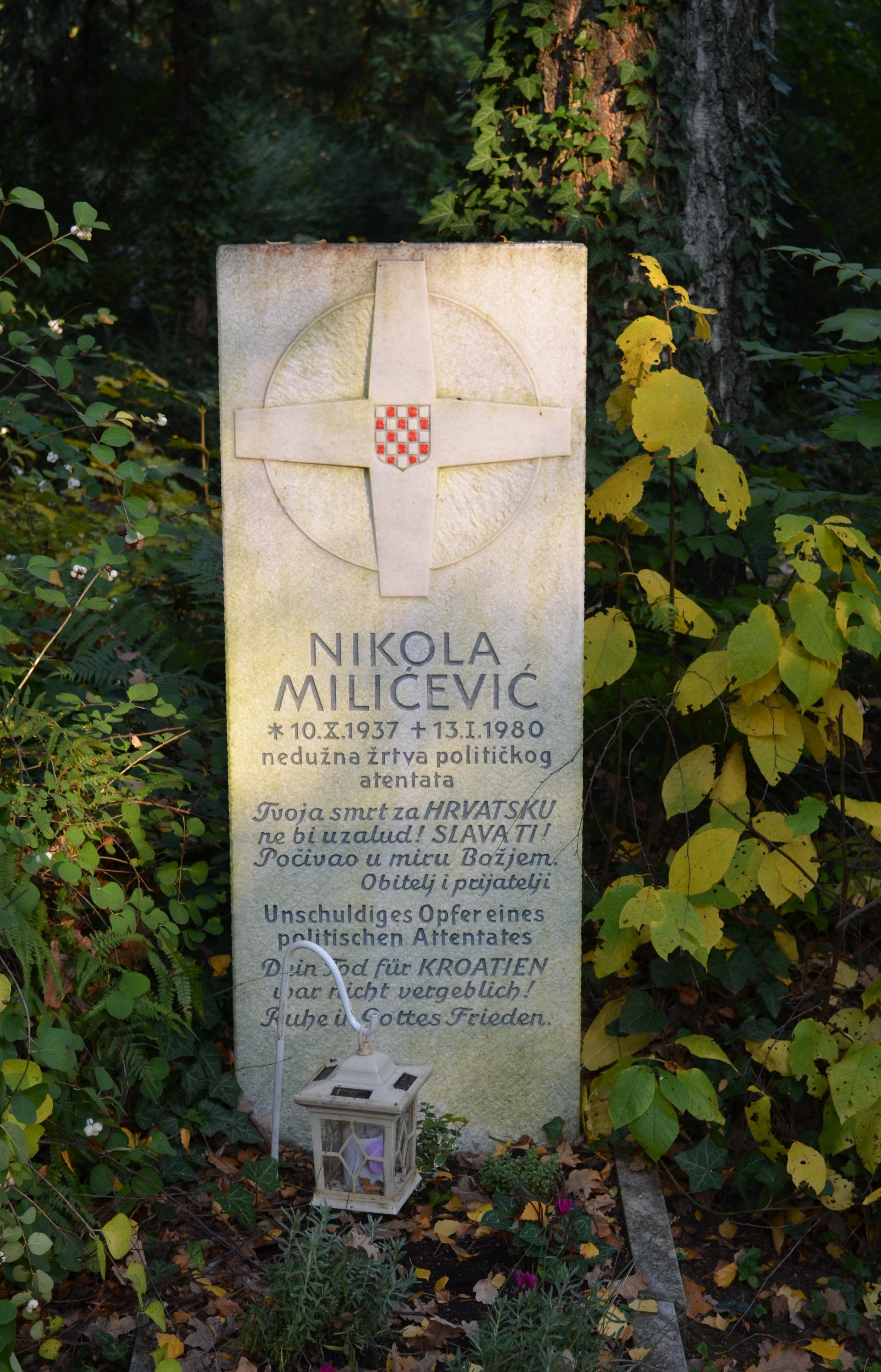 Frankfurt, Hauptfriedhof, Grab Nikola Miličević